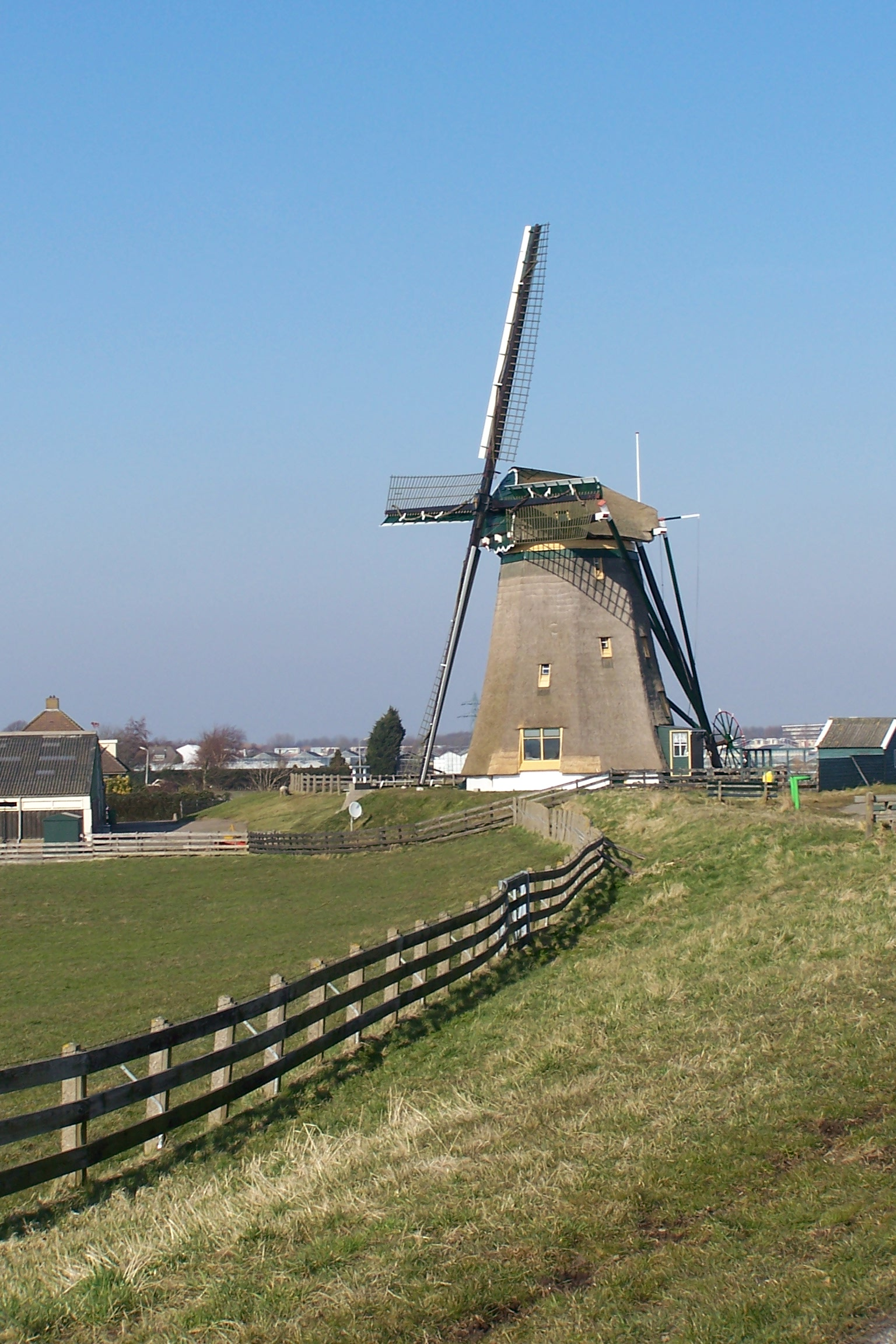 Poelpolder molen te Lisse.